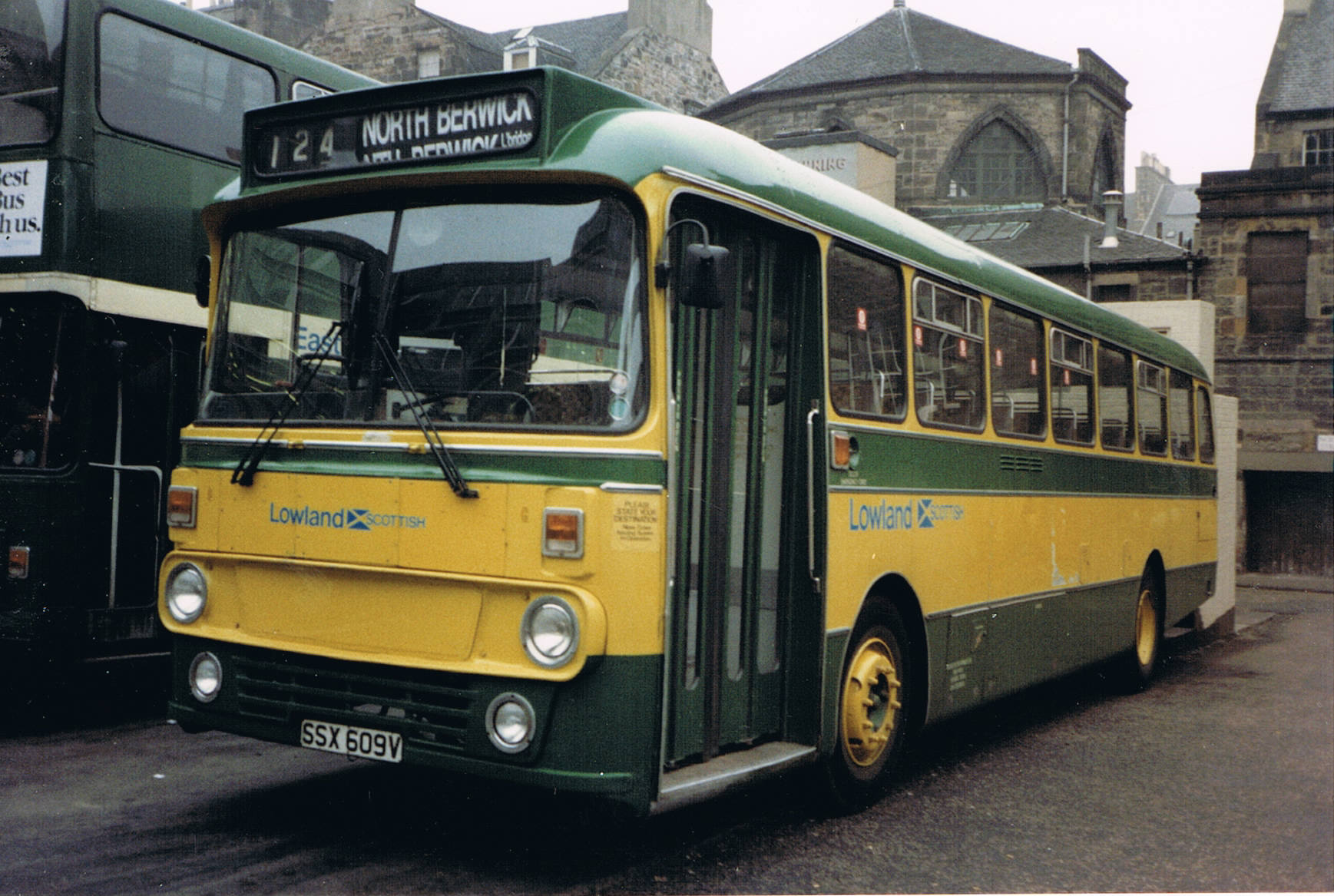 S609 , SSX 609V Seddon Pennine 7 Alexander AYS seen in St Andrews bus station Edinburgh